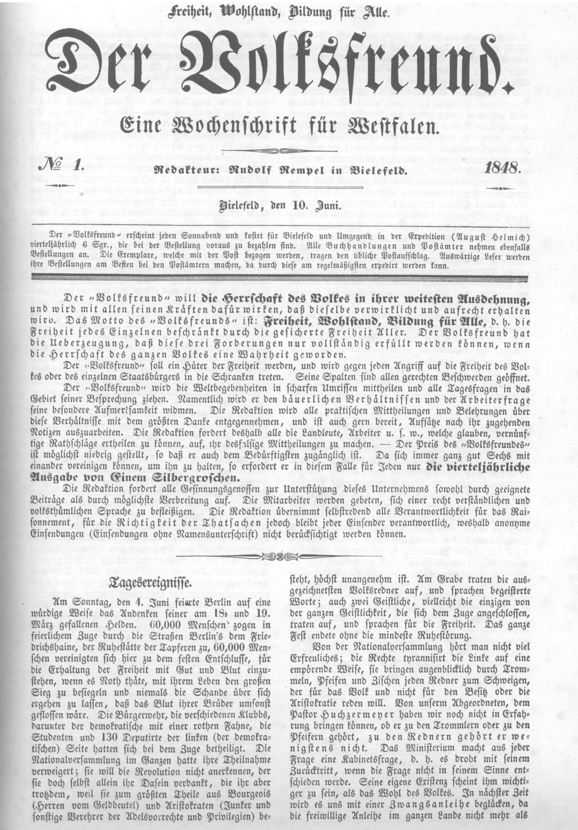 Titelblatt der ersten Ausgabe von "Der Volksfreund - Eine Wochenschrift für Westfalen"